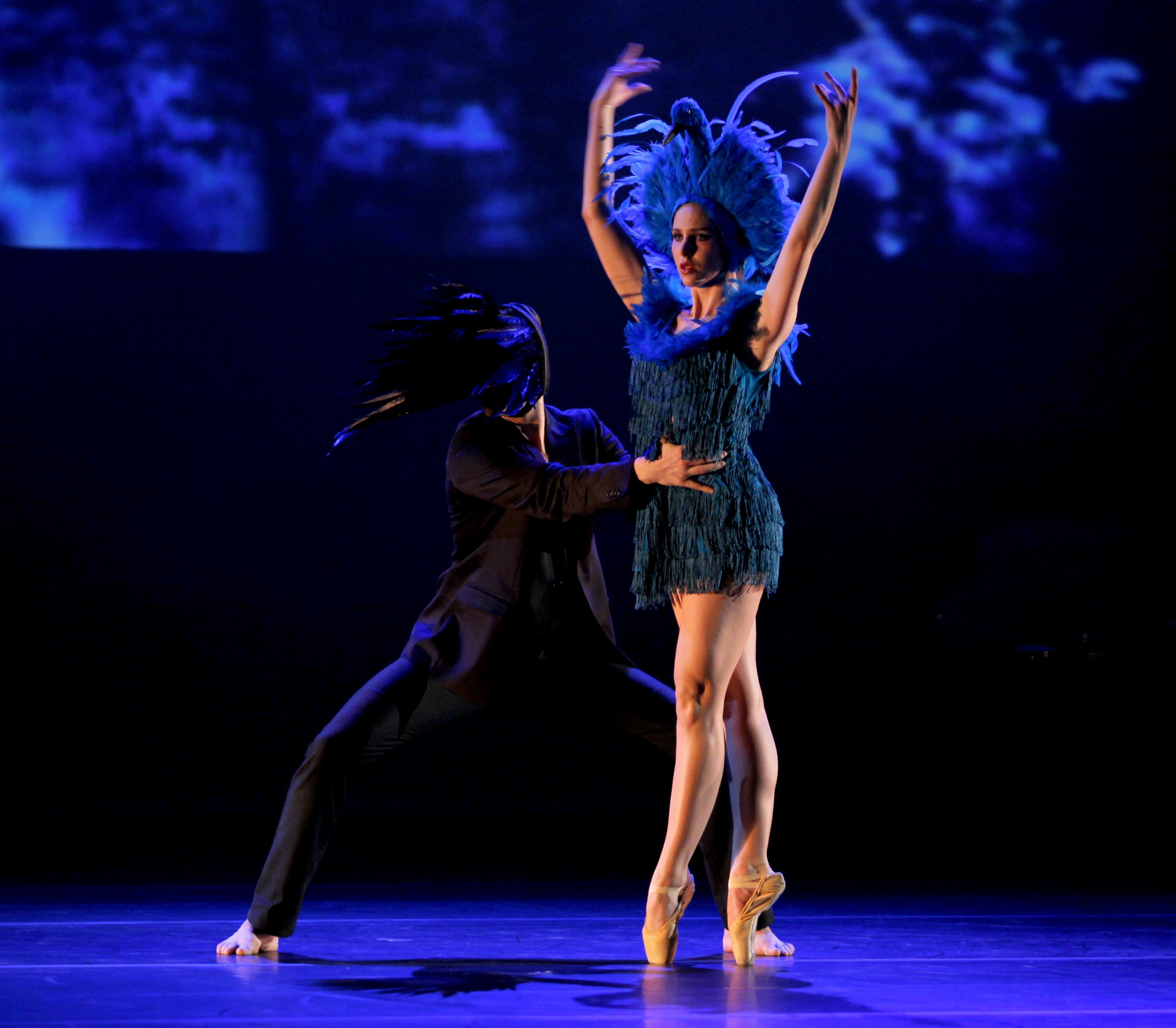 Državna proslava ob Prešernovem dnevu 2010